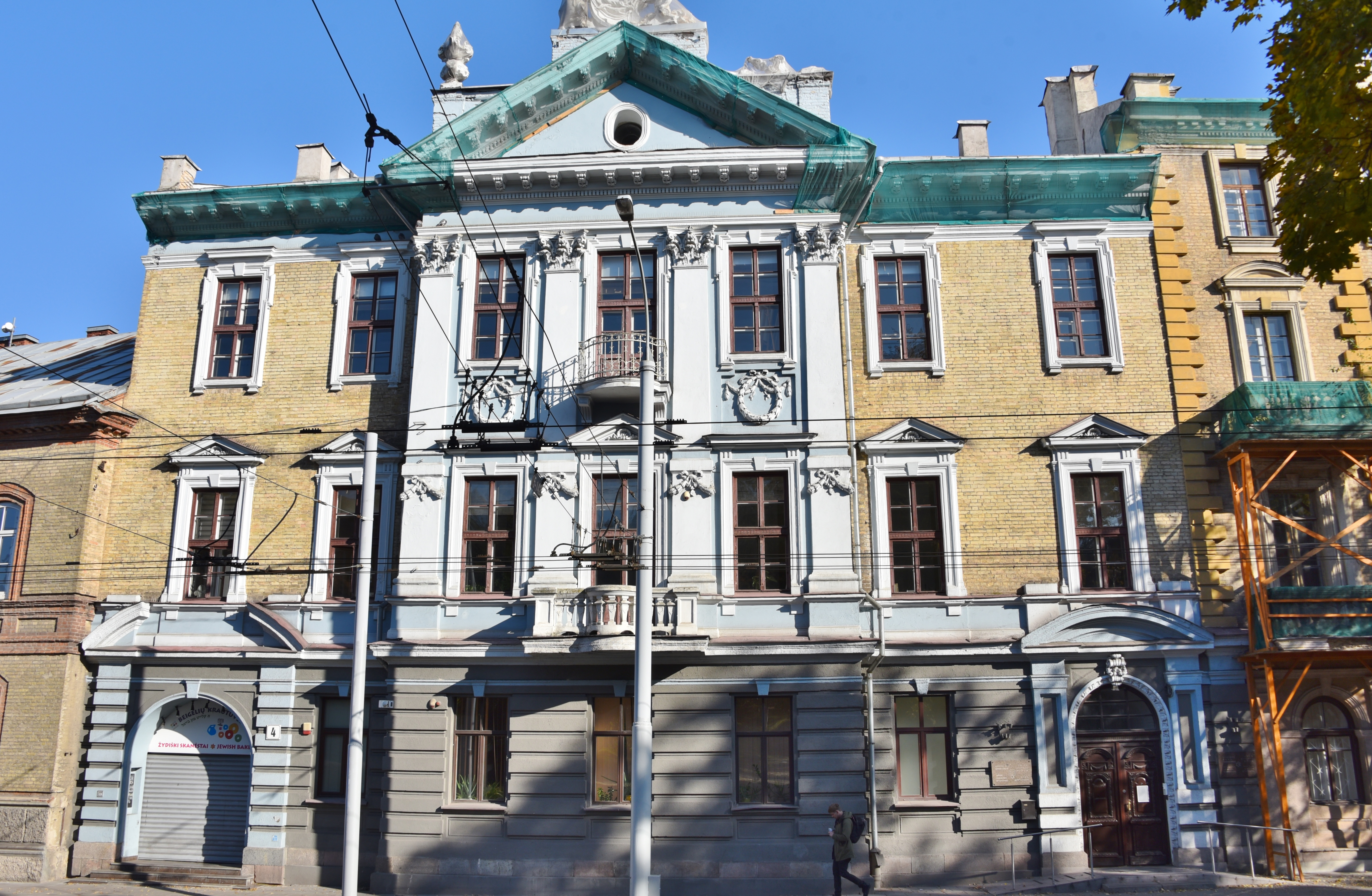 Staatliches Jüdisches Museum Gaon von Vilnius, Architekt Tadeusz Maria Rostworowski. Auch Sitz der Jüdischen Gemeinde Litauens [1]